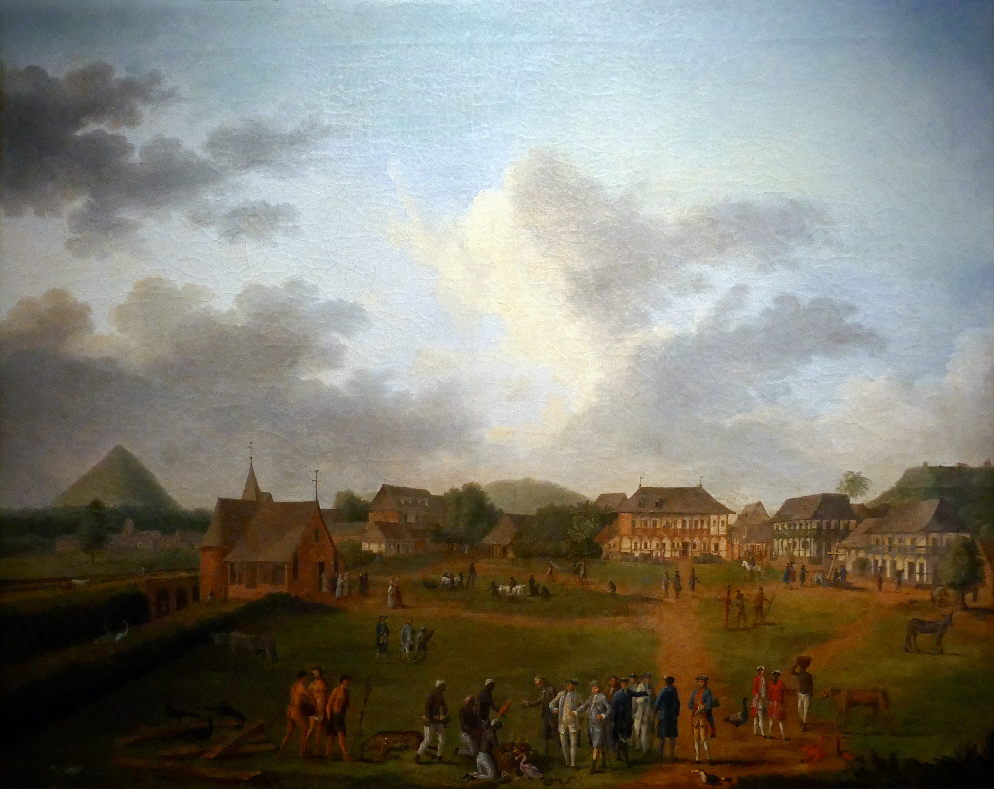 Le Marquis de Turgot gouverneur de Cayenne reçoit les présents des Indiens. (le marquis de Turgot fut nommé gouverneur de Cayenne en 1763). Anonyme, 18e siècle, huile sur toile. Musée d'Aquitaine, Bordeaux.